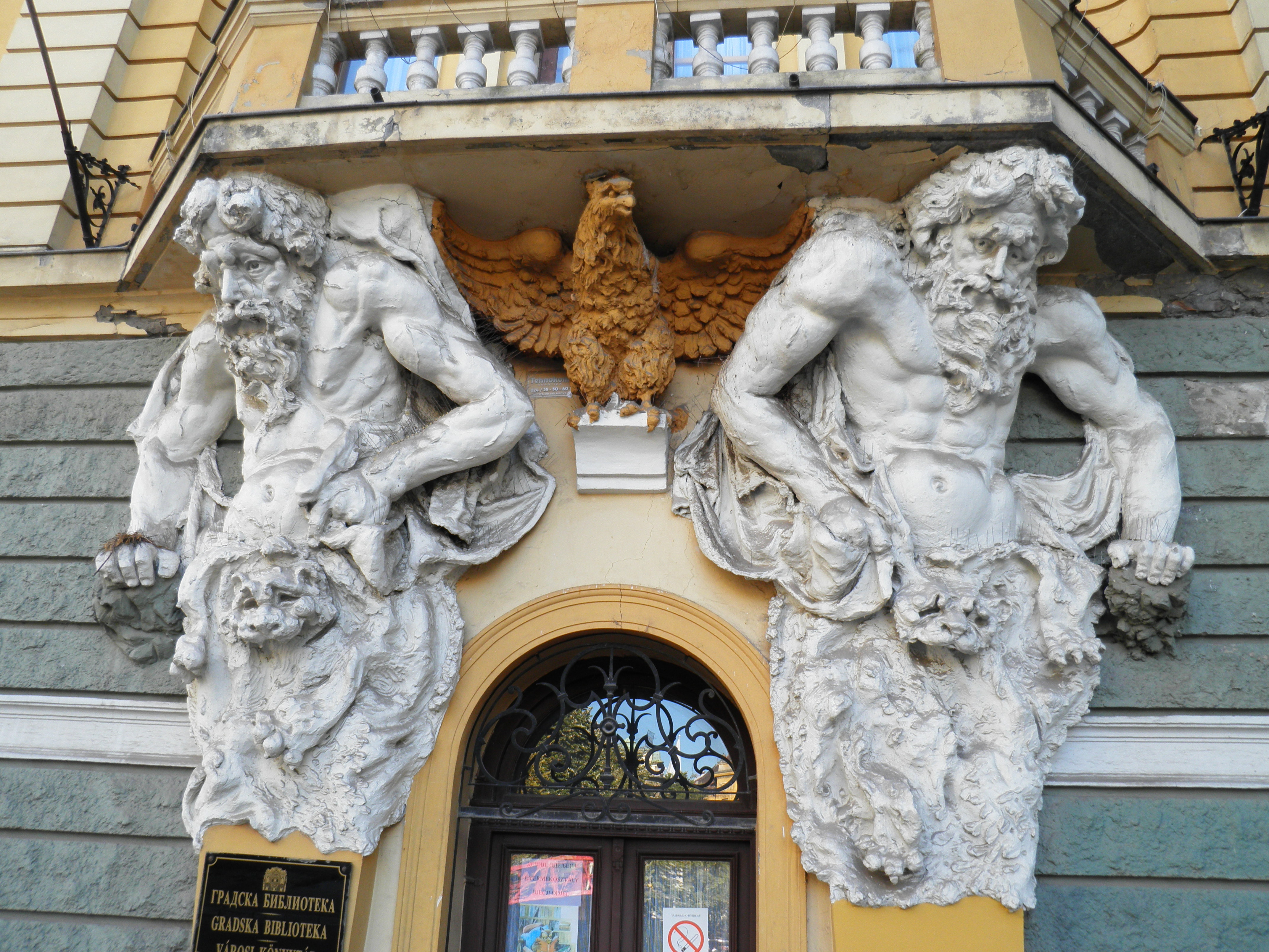 Gradska biblioteka